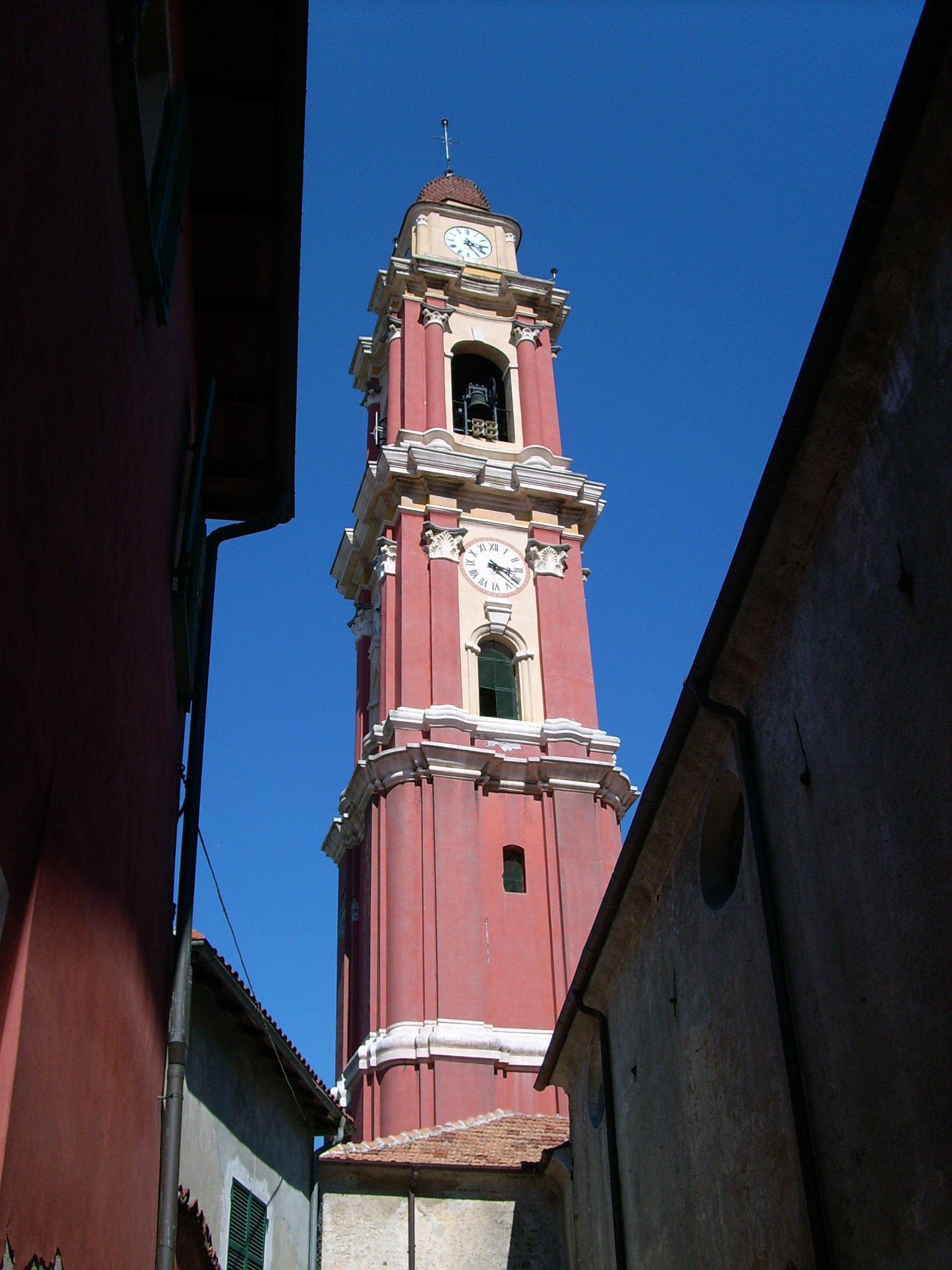 Chiesa di san Lorenzo di Cairo Montenotte, Liguria, Italia